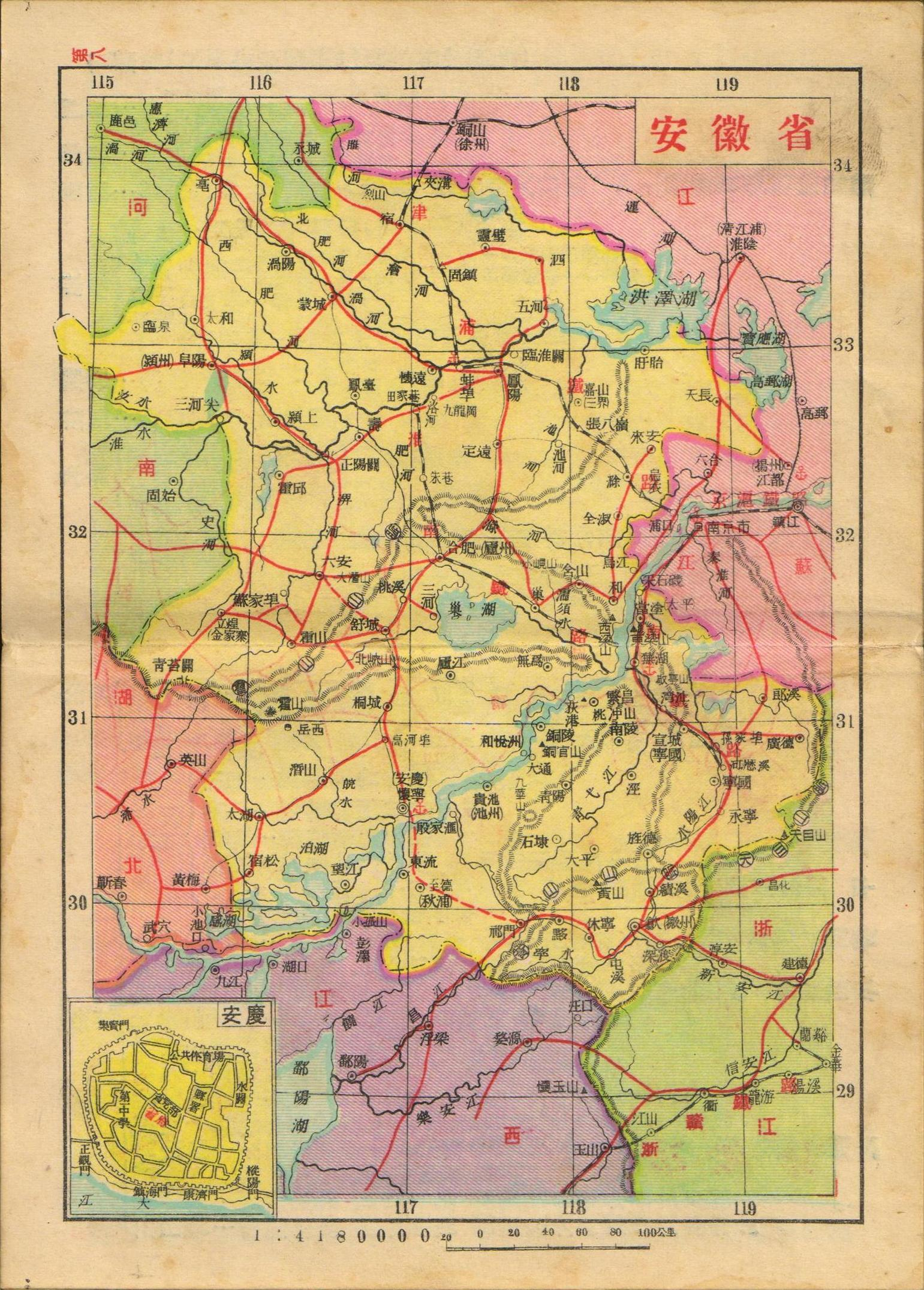 亚新地学社1936年《袖珍中华全图》安徽省